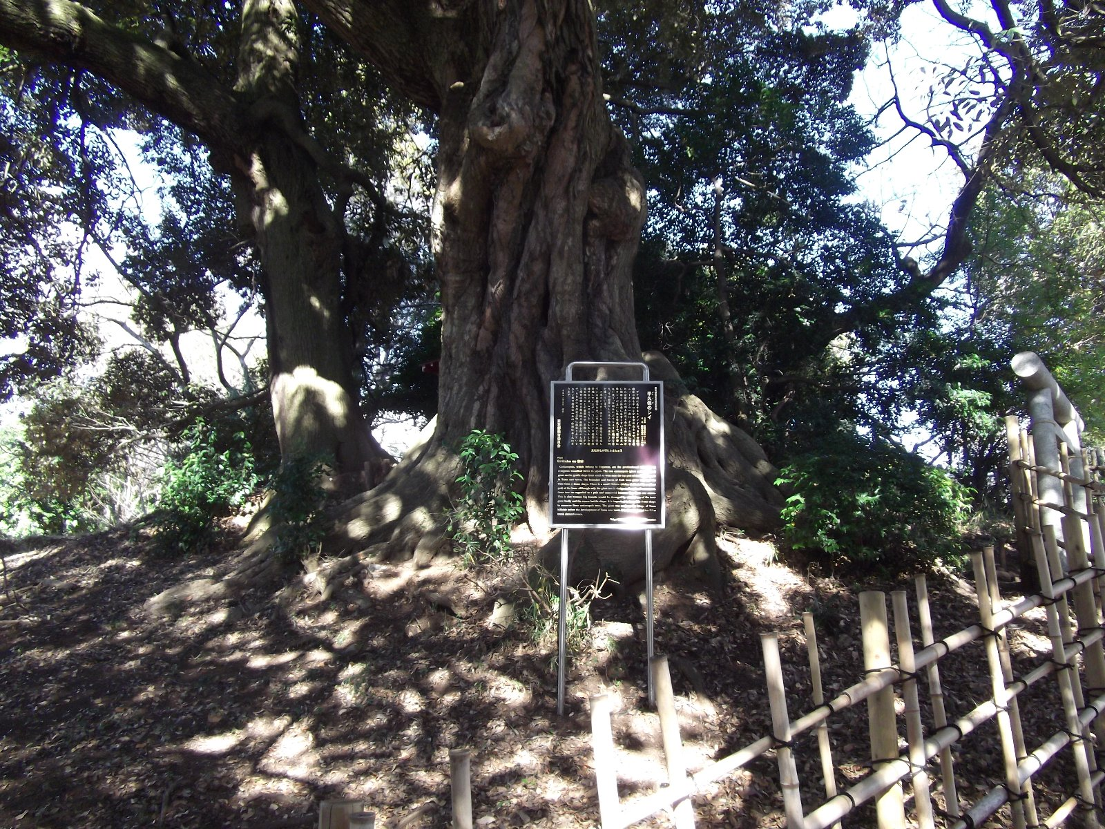 平久保のシイ（東京都多摩市）。東京都指定天然記念物。